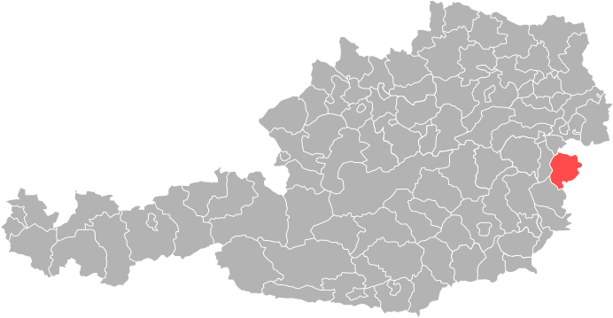 Bezirk Oberpullendorf in Österreich